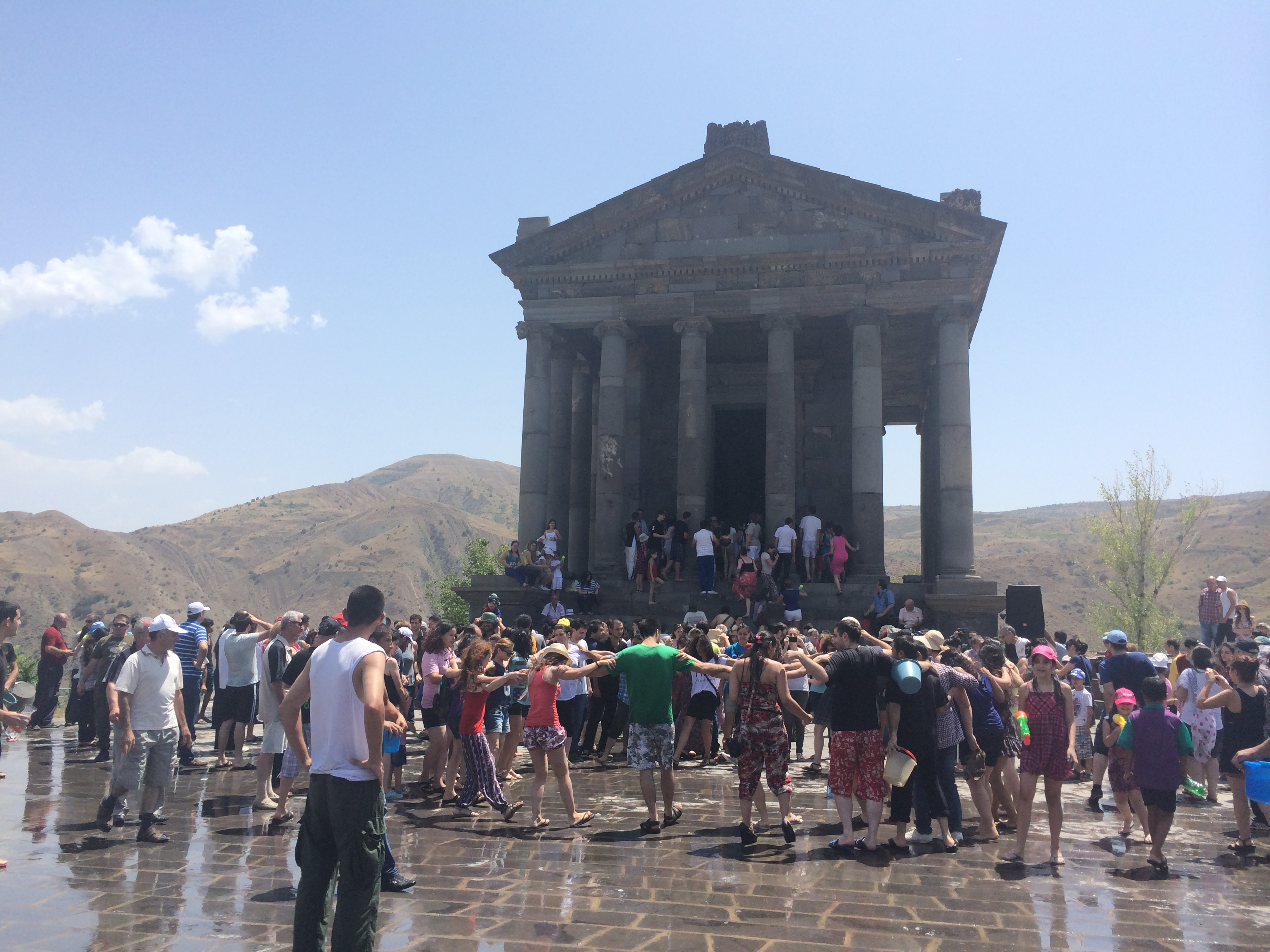 Վարդավառի տոնը, Գառնու տաճար